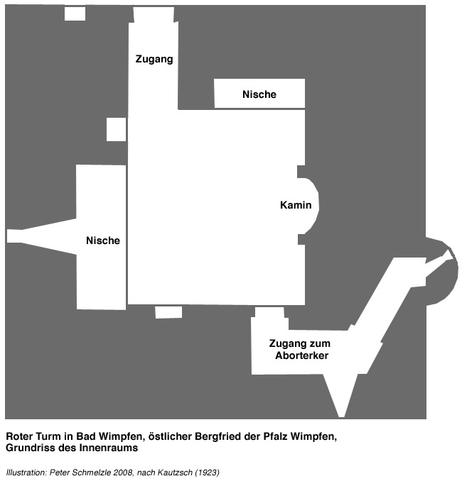 Bad Wimpfen, Grundriss des Roten Turms der Pfalz Wimpfen